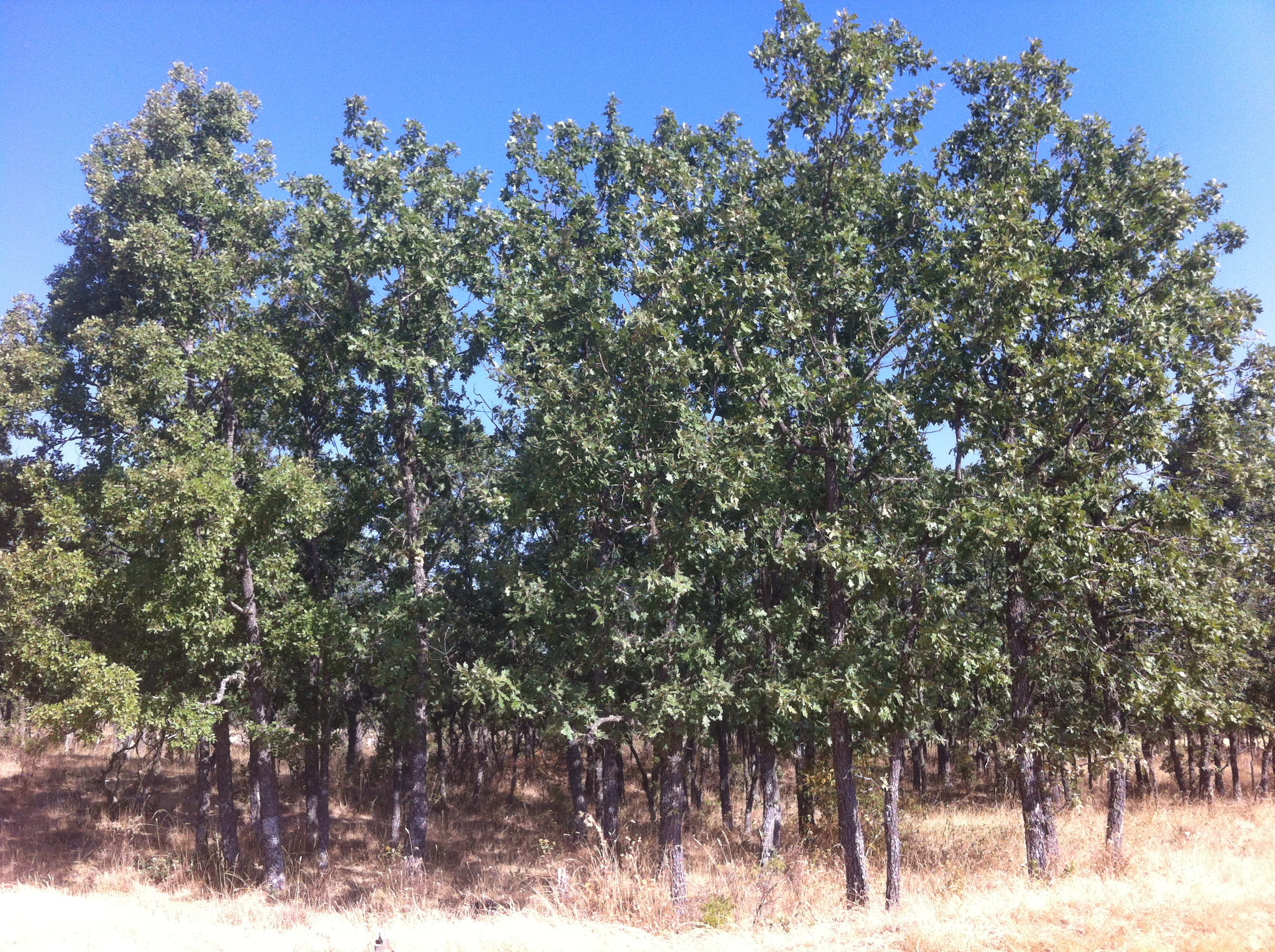 Robledal de Peñausende